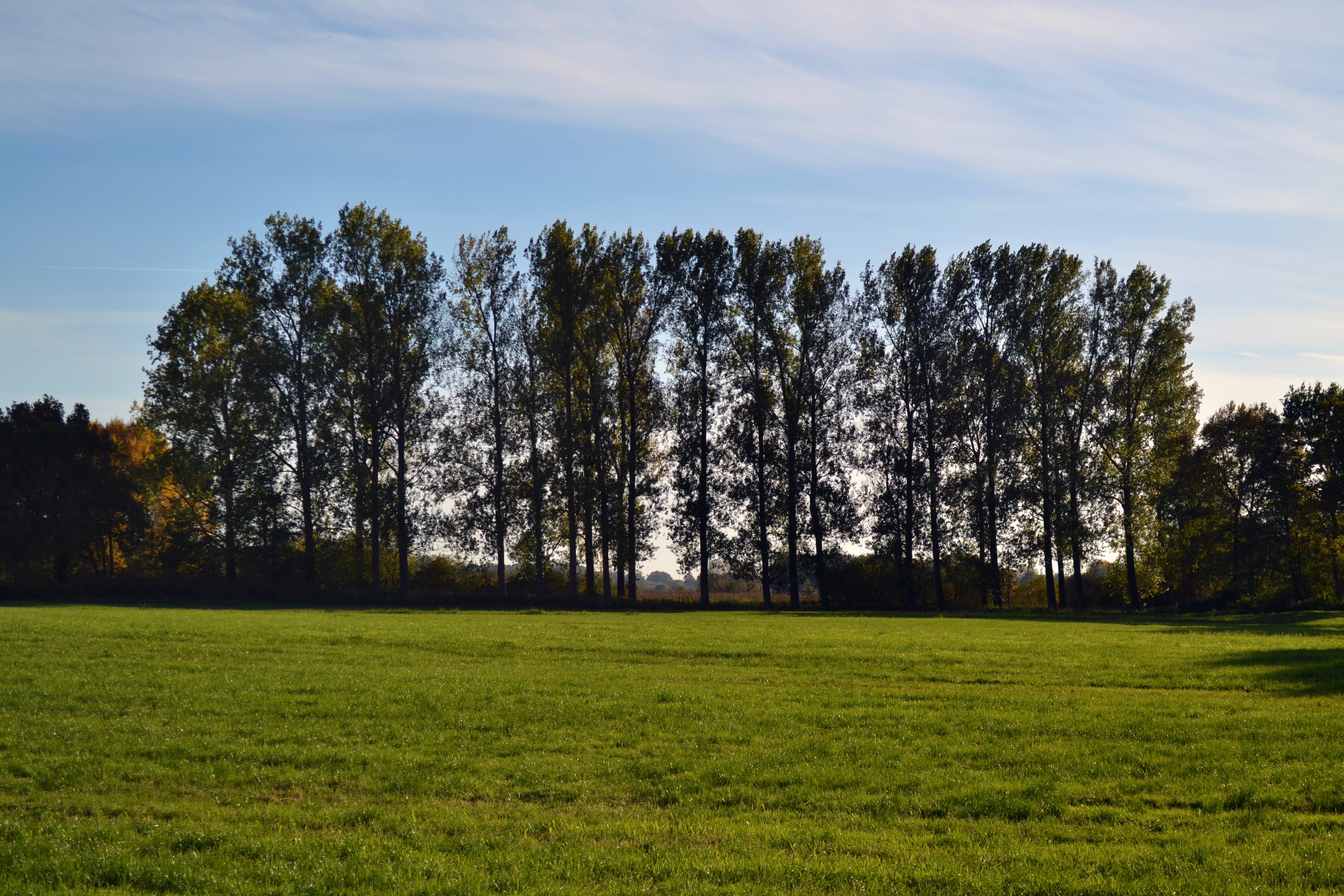 Aufnahme der Pappeln neben dem Oste-Hamme-Kanal in Spreckens, Bremervörde.